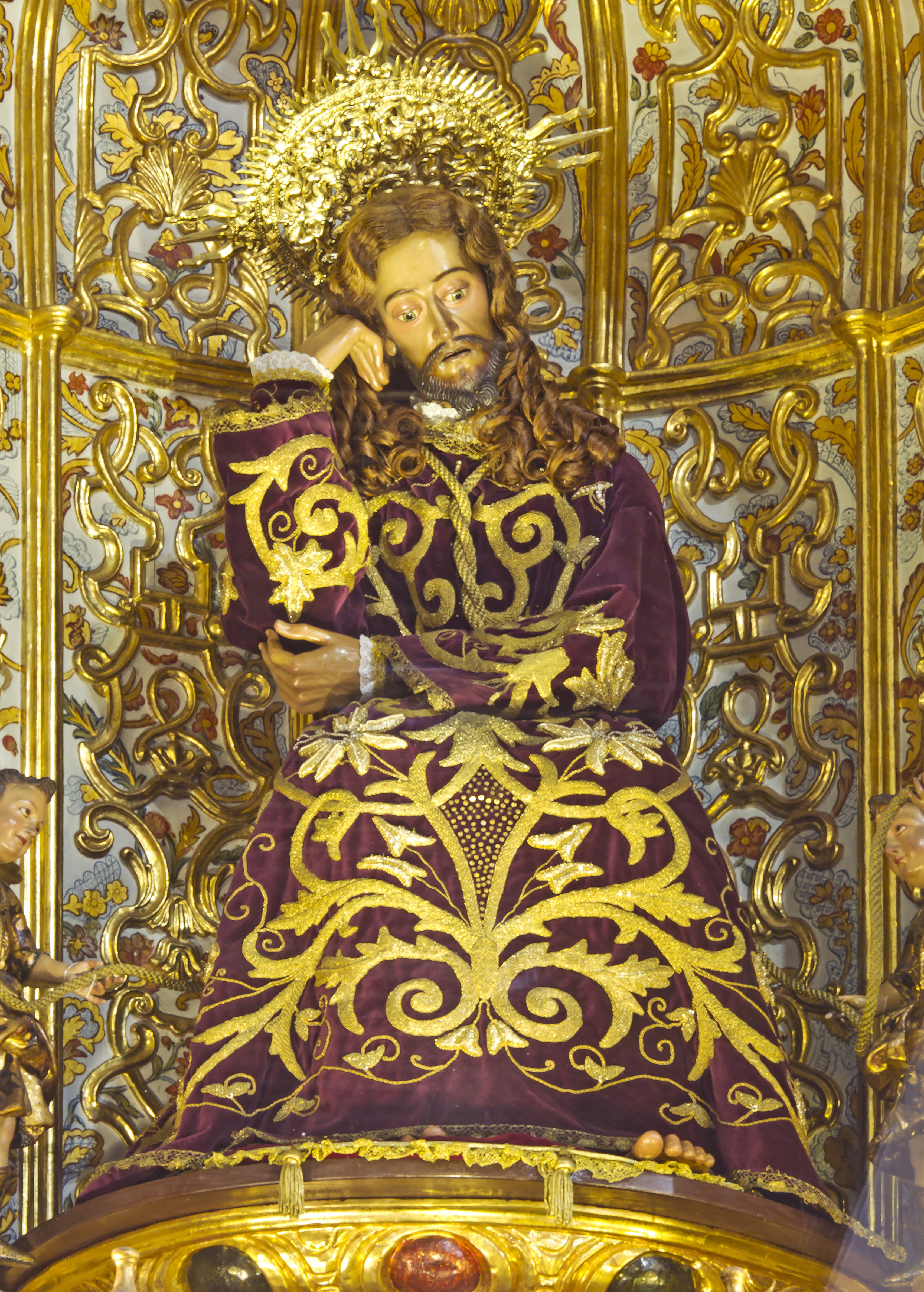 Parroquia de Nuestra Señora de la Peña de Francia, Gran Poder de Dios, Madera tallada, policromada y tejidos naturales. Anónimo ¿Tenerife?, c. 1706